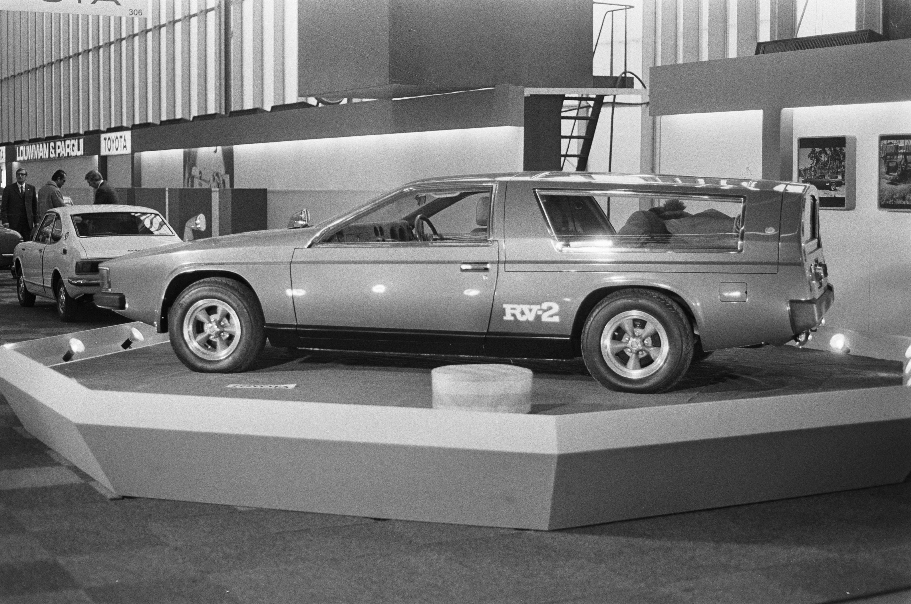 Collectie / Archief : Fotocollectie Anefo Reportage / Serie : [ onbekend ] Beschrijving : Voorbezichtiging Persnonenauto RAI 1973 , overzicht Datum : 7 februari 1973 Locatie : Amsterdam, Noord-Holland Trefwoorden : auto's Instellingsnaam : RAI Fotograaf : Peters, Hans / Anefo Auteursrechthebbende : Nationaal Archief Materiaalsoort : Negatief (zwart/wit) Nummer archiefinventaris : bekijk toegang 2.24.01.05 Bestanddeelnummer : 926-2107